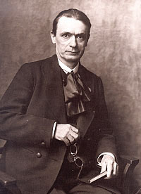 Rudolf Steiner (1861-1925) osztrák polihisztor, filozófus, író, dramaturg, tanár, a spirituális mozgalom, az antropozófia megalkotója